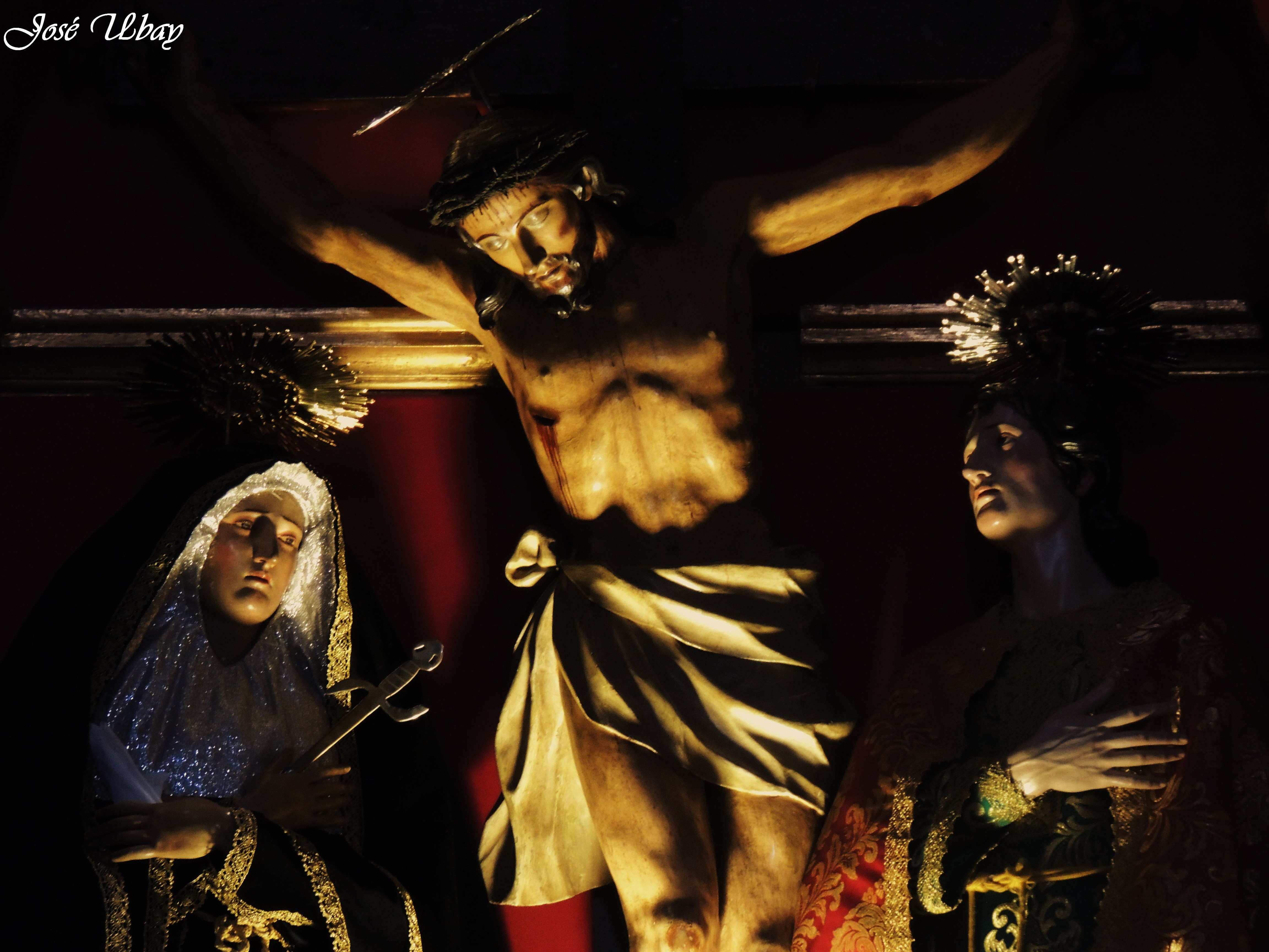 Santo Calvario de la Basílica de Nuestra Señora del Pino de Teror (Gran Canaria).